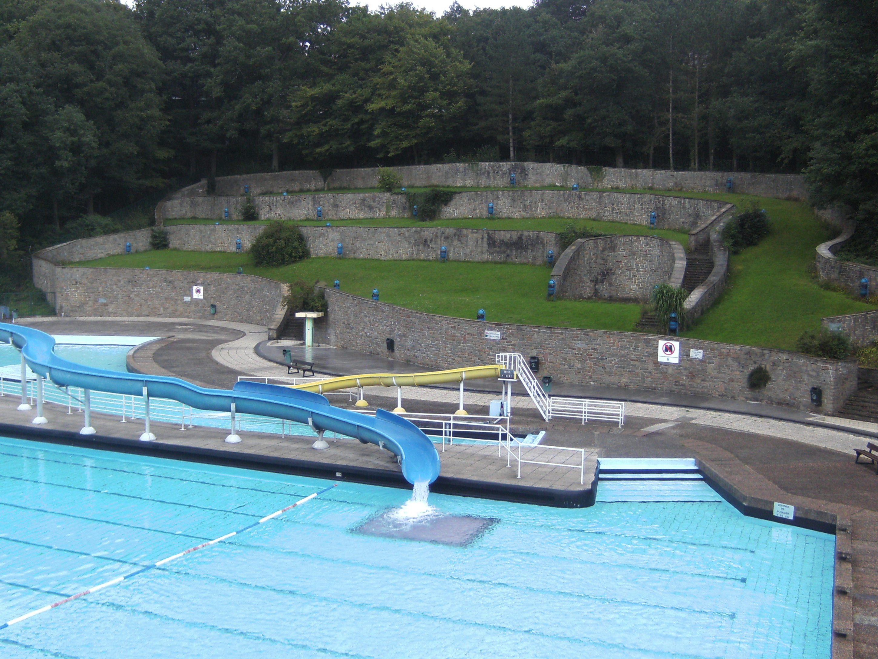 Marcinelle (Charleroi-Belgique) - Piscine du centre de délassement en juillet 2011.